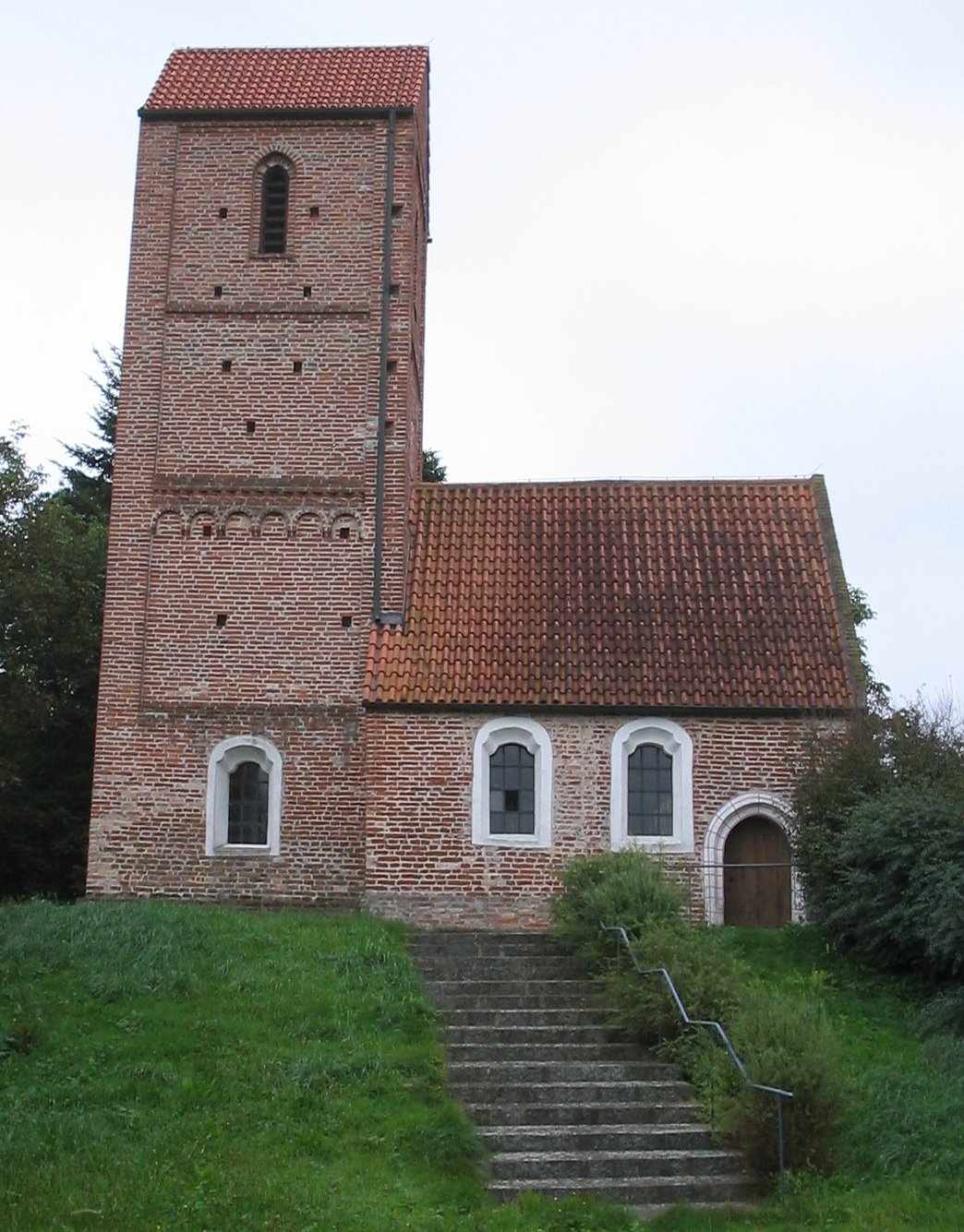 Filialkirche St. Petrus in Griesbach bei Uttenhofen, Ortsteil von Pfaffenhofen an der Ilm